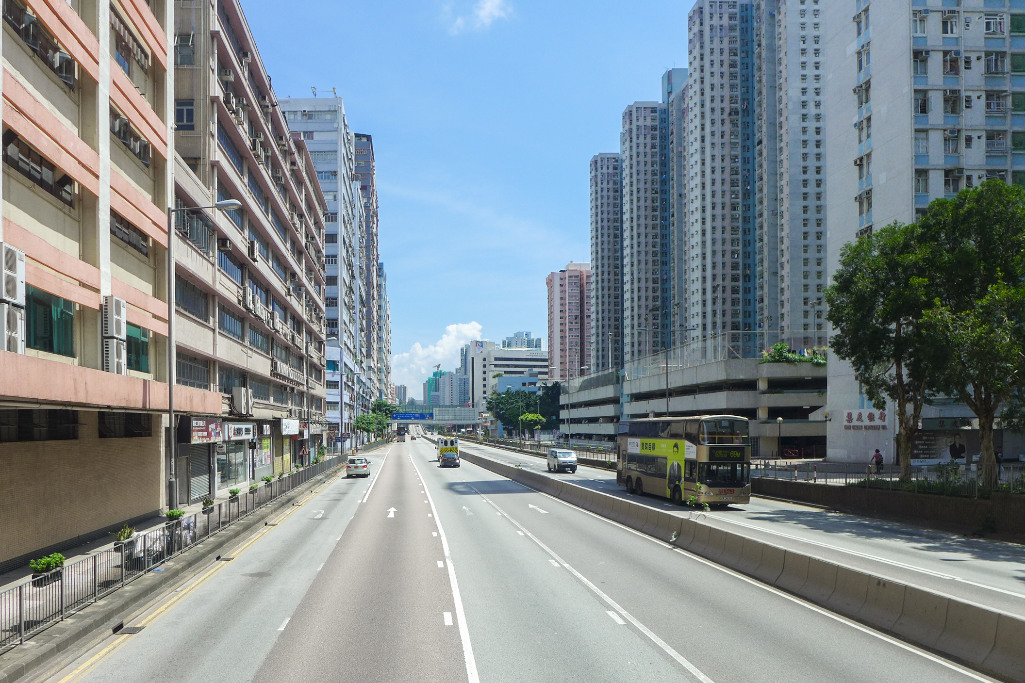 Kwai Chung Road